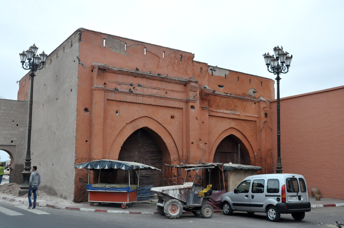 Puerta Bab Er-Robb,en la parte exterior de la ciudad de Marrakech, junto a la Puerta Bab Agnaou